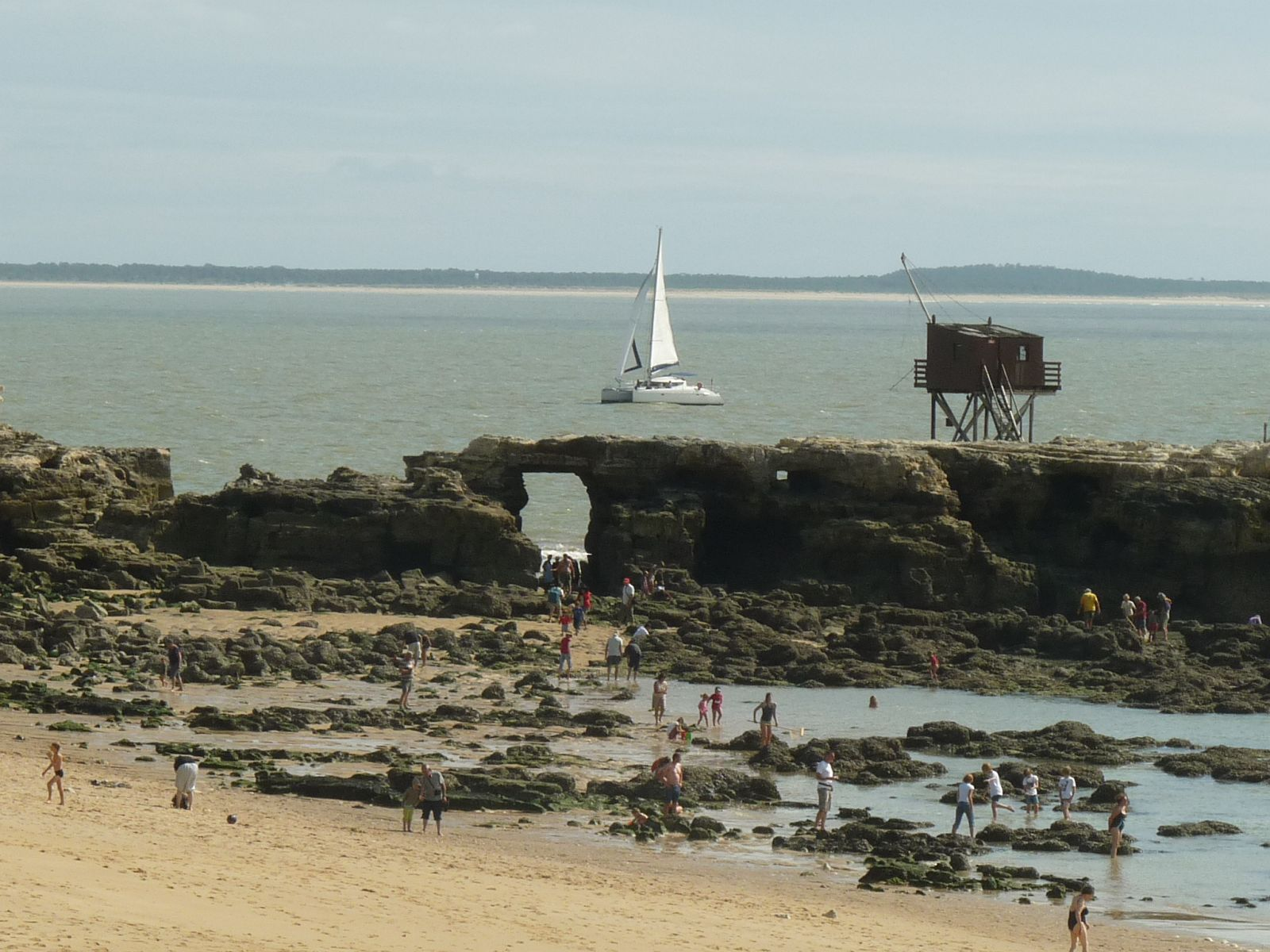 Le Pont du Diable à St-Palais-sur-Mer (17), France